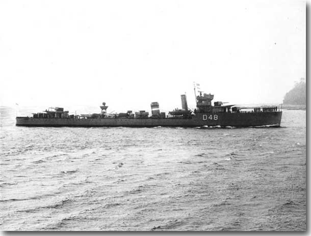 Эсминец HMS Vidette